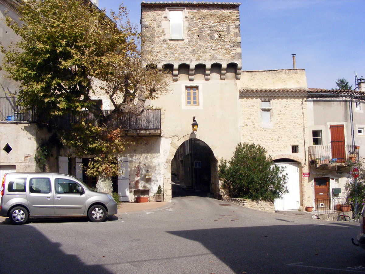 Place de l'Horloge